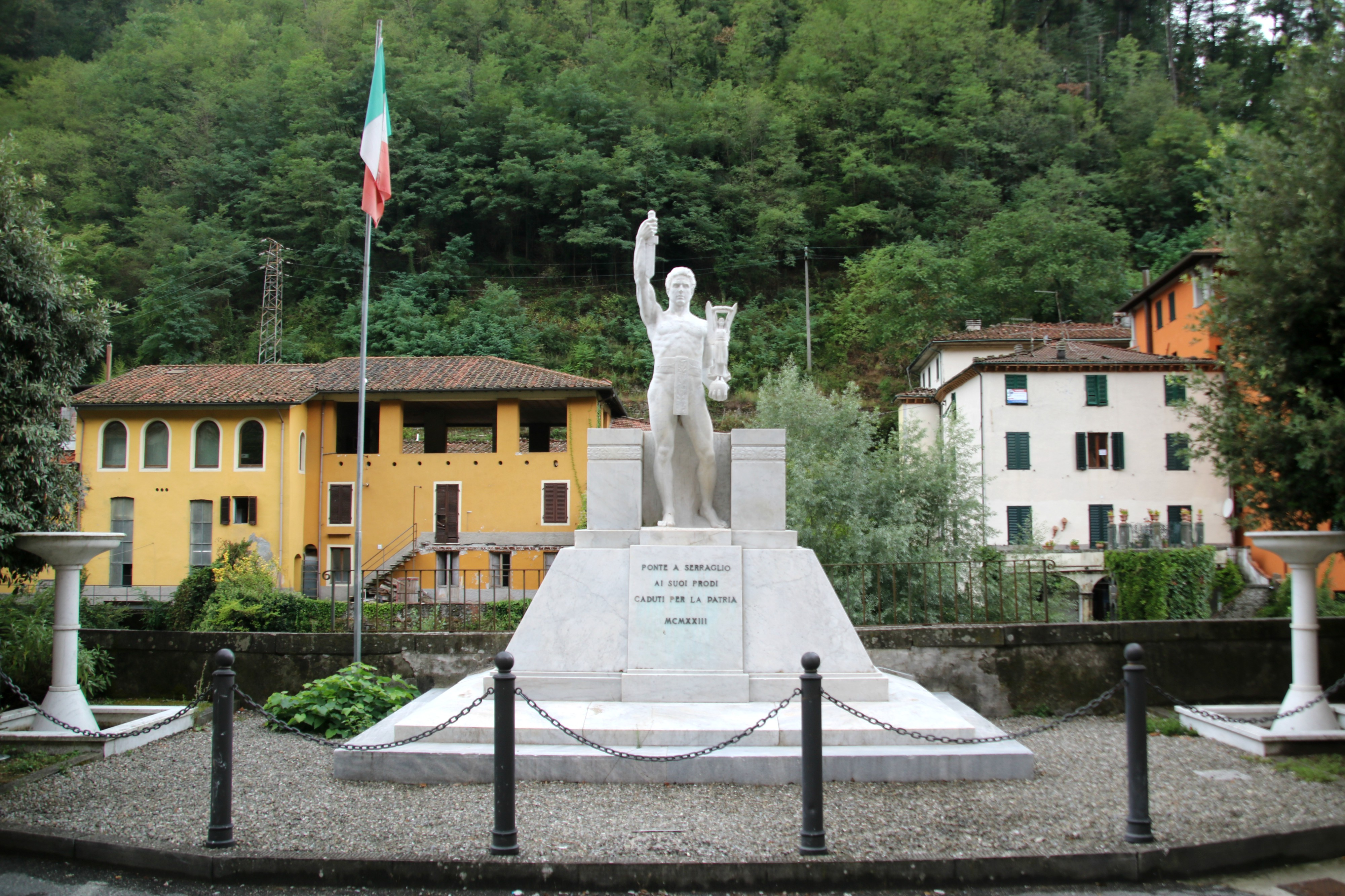 Monumento ai caduti di Ponte a Serraglio This is a photo of a monument which is part of cultural heritage of Italy.